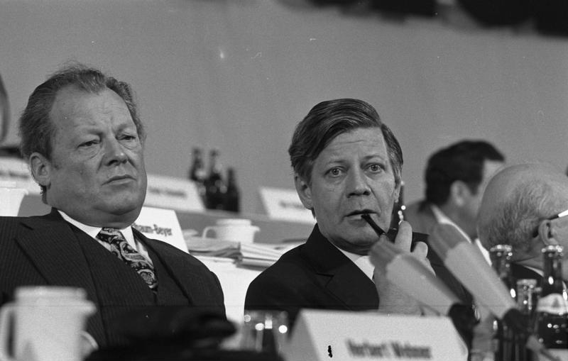 Bundesparteitag der SPD in Hannover (links: Willy Brandt, rechts: Helmut Schmidt) 10.-14.4.1973